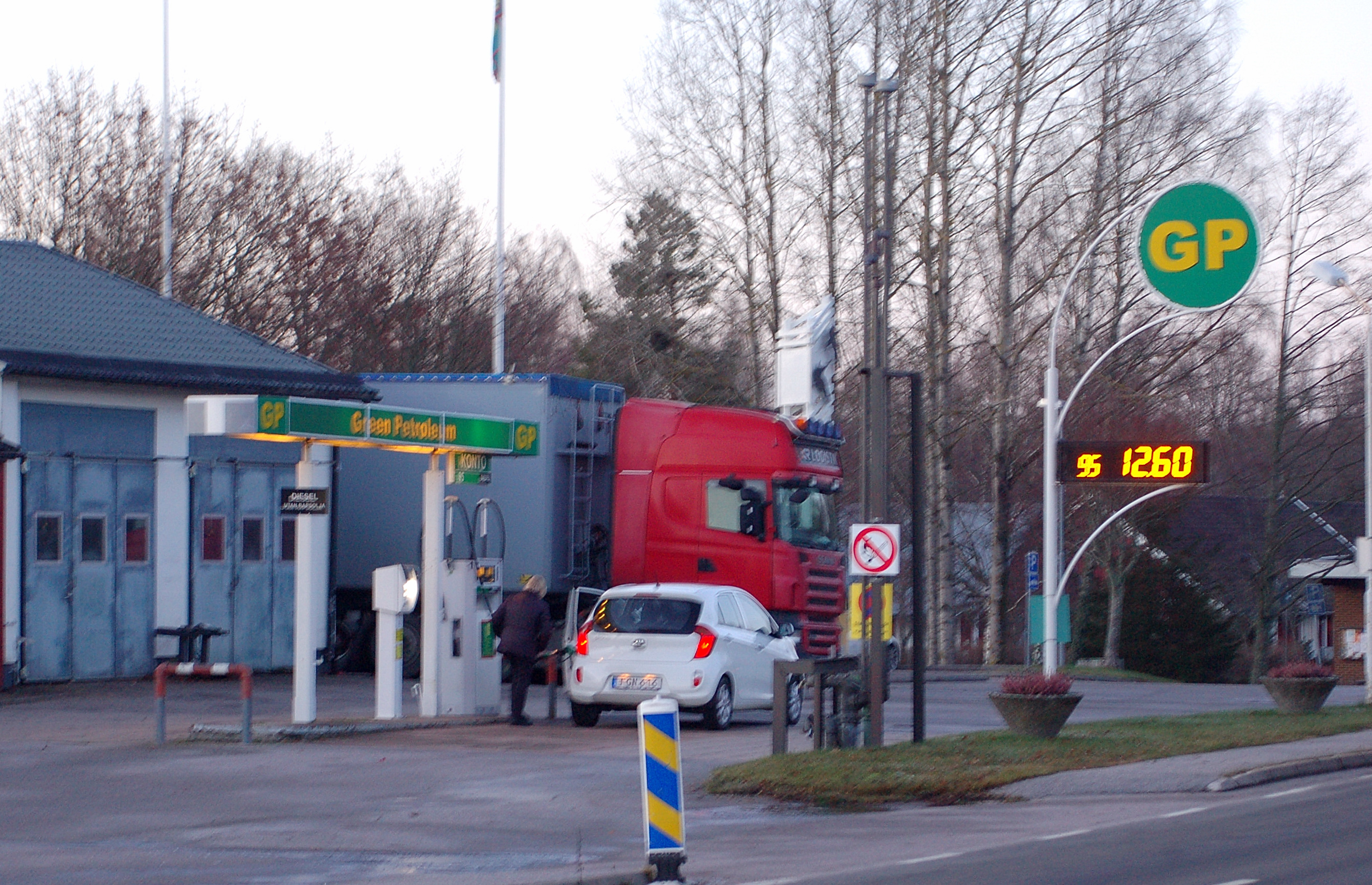 Green petroliums bränsledepå i Sjötorp.